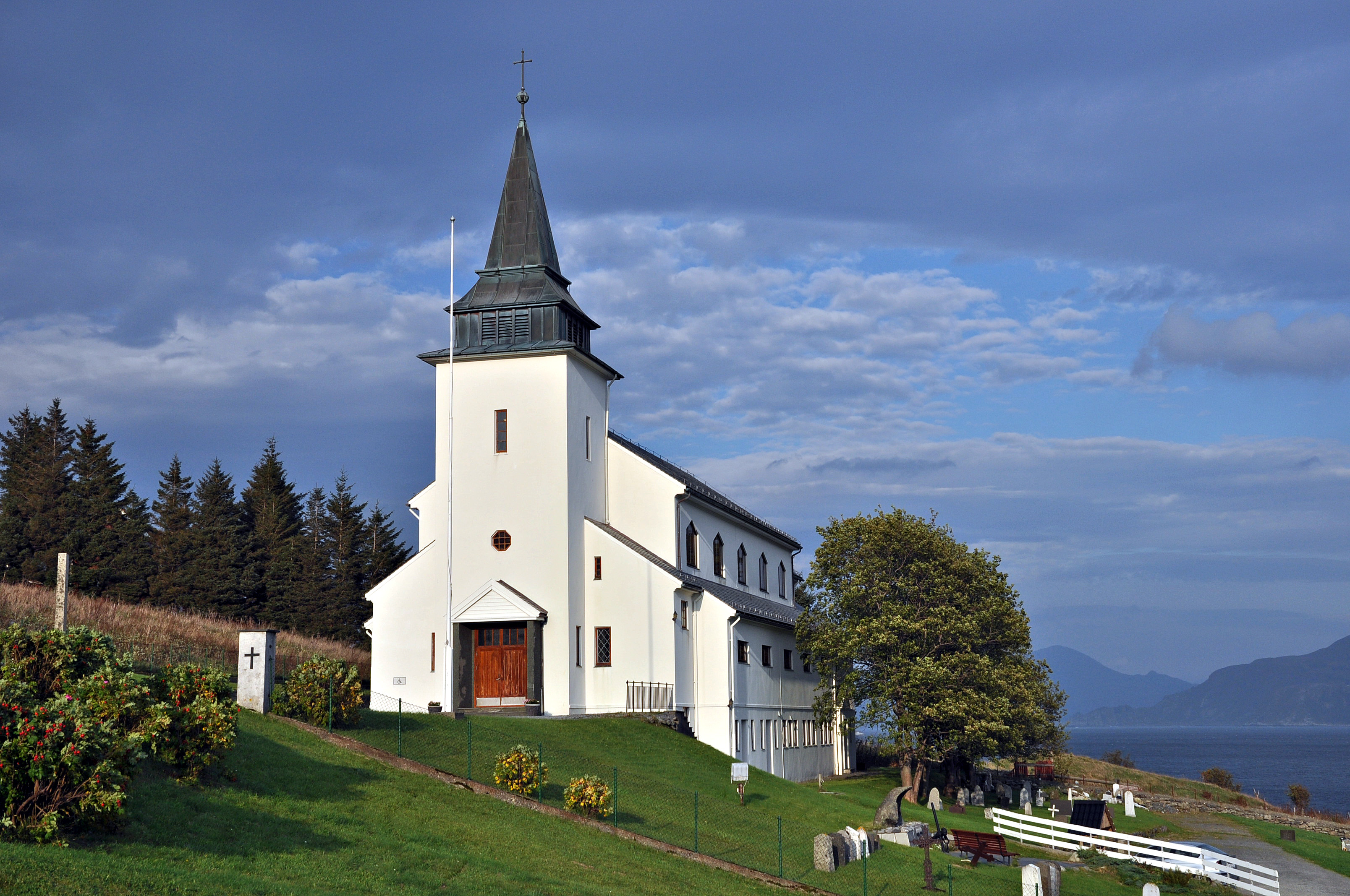 Nord-Vågsøy kyrkje ligg på Raudeberg i Vågsøy kommune, Sogn og Fjordane. Kyrkja står på Røysaneset, ved innseglinga til Ulvesundet frå nord. Der stod også den gamle kyrkja på Nord-Vågsøy som brann ned etter lynnedslag i 1945. Noverande Nord-Vågsøy kyrkje er ei langkyrkje bygd i betong. Biskop Ragnvald Indrebø vigsla kyrkja i 1960. Arkitekt for bygget var Ole Halvorsen. Kjelder: Fylkesarkivet i Sogn og Fjordane, Vågsøy sokneråd GPS-posisjon: 61.59.18 N, 5.09.07 Ø